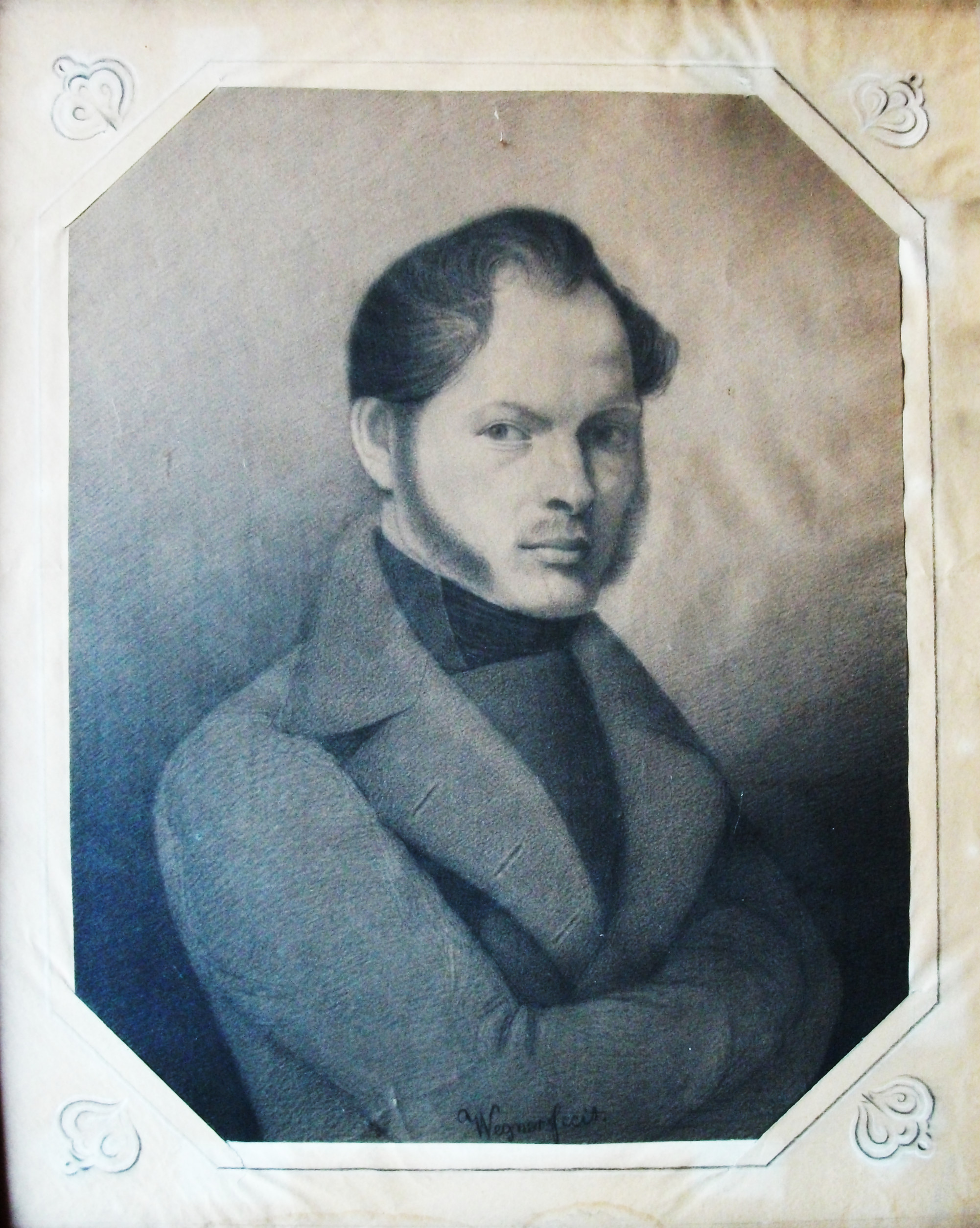 Adam Konrad Boeninger, geboren 1810 Albersweiler, gestorben 1886 Worms) Vermerk auf Rückseite: "Adam Konrad Boeninger im Alter von 23 Jahren" (=1833), Bildunterschrift "Wegner fecit" (vermutlich Ludwig Wegner, Lithograph, geboren 1816 Frankenthal, gestorben 1864 Amsterdam)